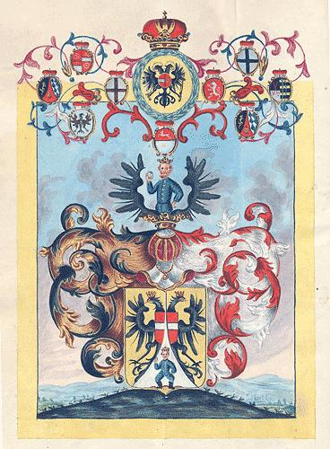 Wappen (nach dem Adelsdiplom Kaiser Karls VI. vom 24. Juni 1737, Abschrift anlässlich Überprüfung des Adelsstandes des Ravensburger Stadtschultheißen Franz von Zwerger und seiner Familie, mit farbiger Darstellung des Familienwappens auf Landschaftshintergrund, mit Wappen der neun Kurfürsten, Krone und Reichsadler)